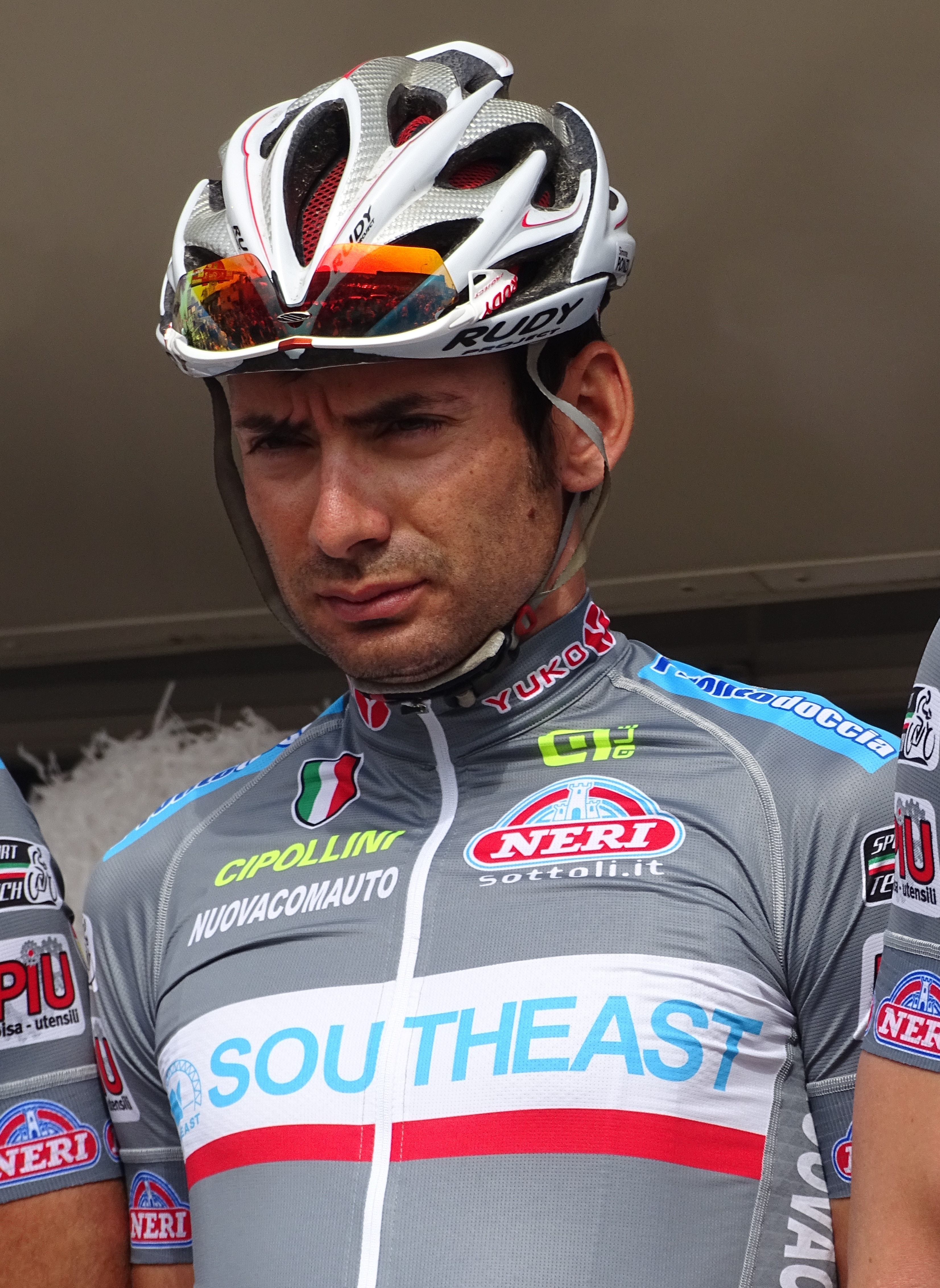 Reportage réalisé le jeudi 16 avril à l'occasion du départ et de l'arrivée du Grand Prix de Denain 2015 à Denain, Nord, Nord-Pas-de-Calais, France.